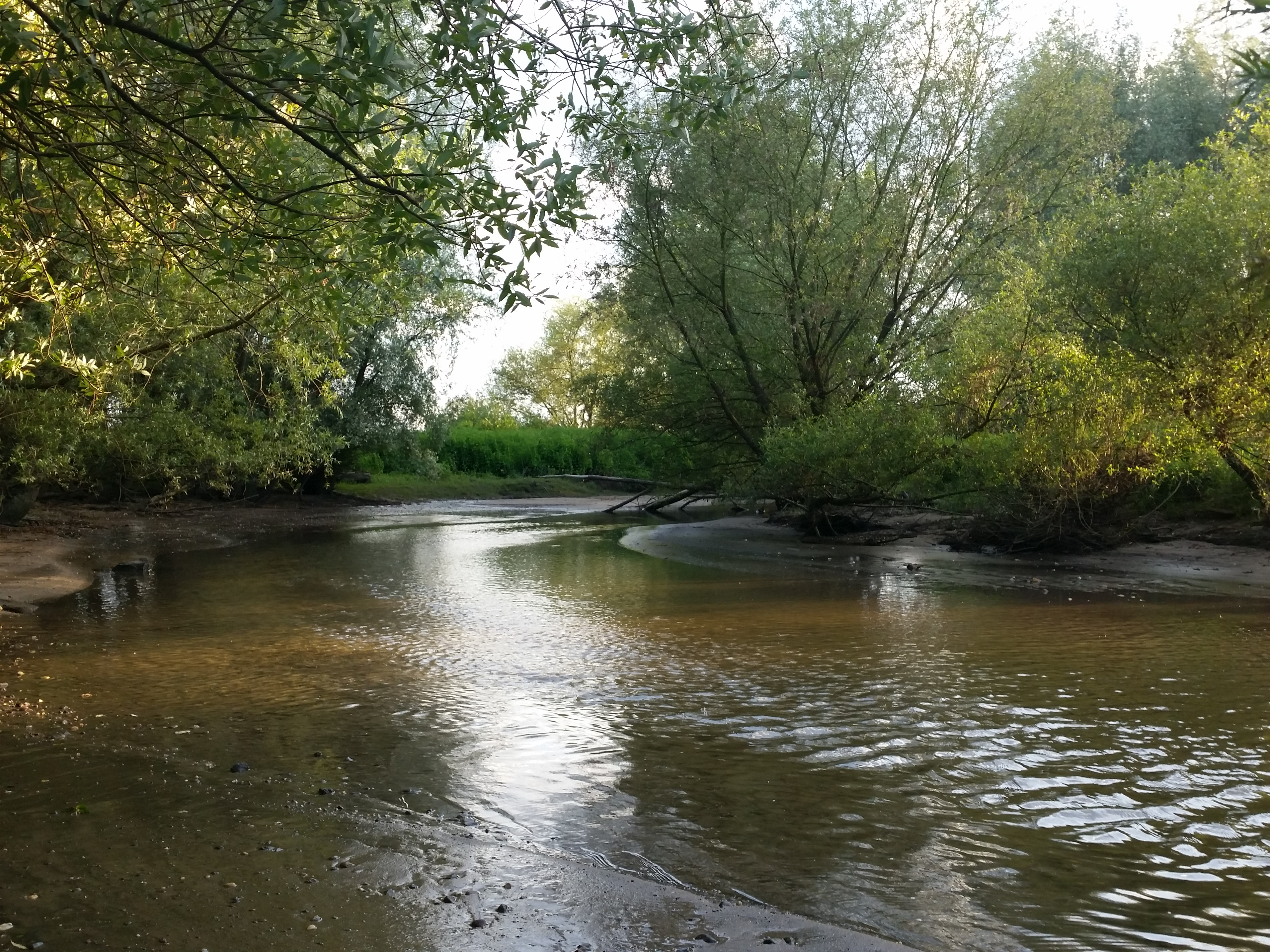 Mündung des Urdenbach in den Rhein, bei Düsseldorf, am Abend